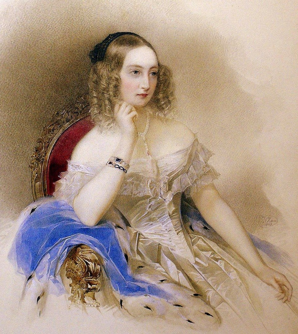 Портрет Великой княгини Елены Павловны(1806-1873)